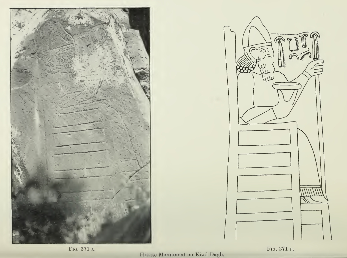 Fotografie und Umzeichnung des späthethitischen Felsreliefs und der hieroglyphen-luwischen Inschrift Kizildag 1 vom Felsen Kizildag in der Südtürkei